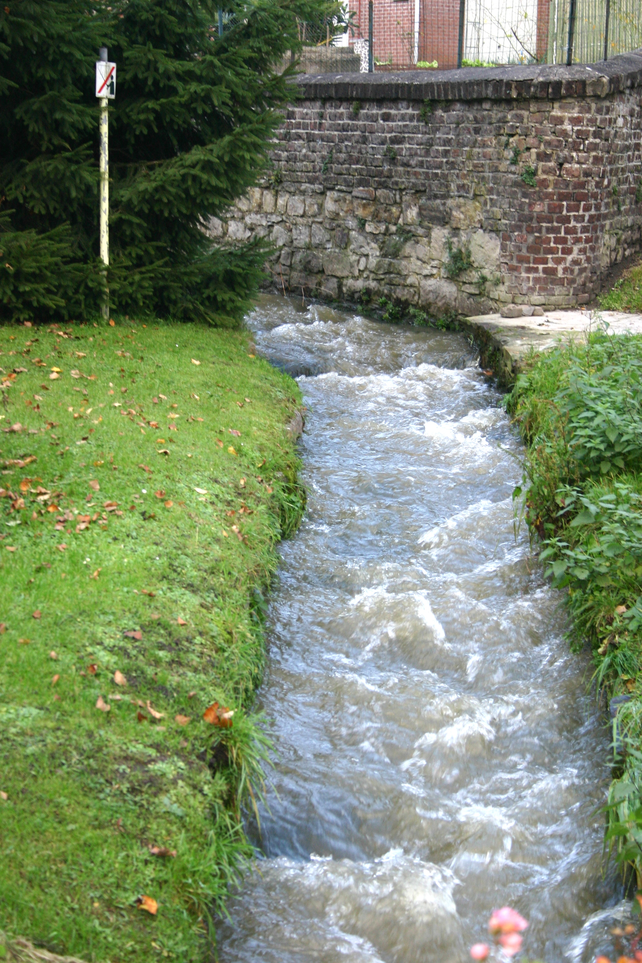 De Ry de Vaux direkt no dem Moulin du Ry de Vaux. Kategorie:Baachen an der Belsch Ri de Vaux